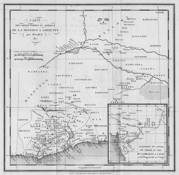 "Carte des Decouvertes en Afrique de la Mission A Ashienty par Bowdich"